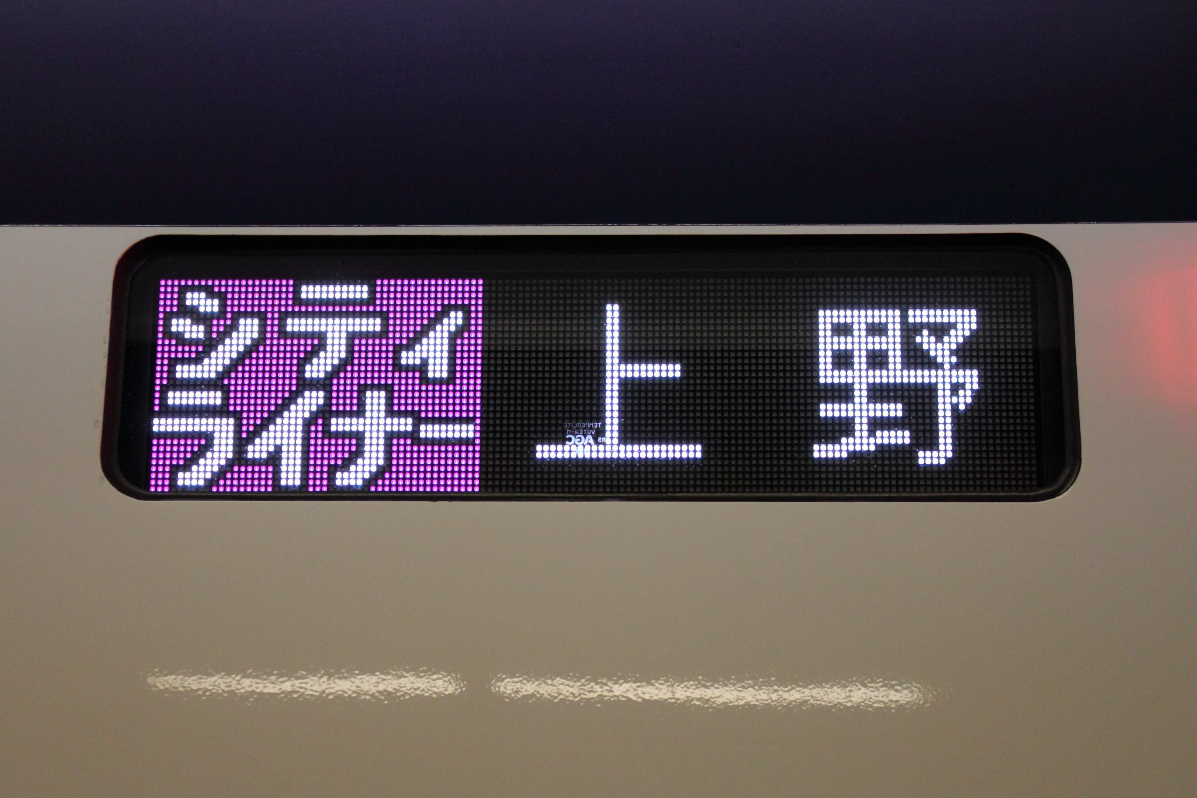 2011年元日に運転された2代目AE形による特急シティライナー。京成成田駅にて撮影。